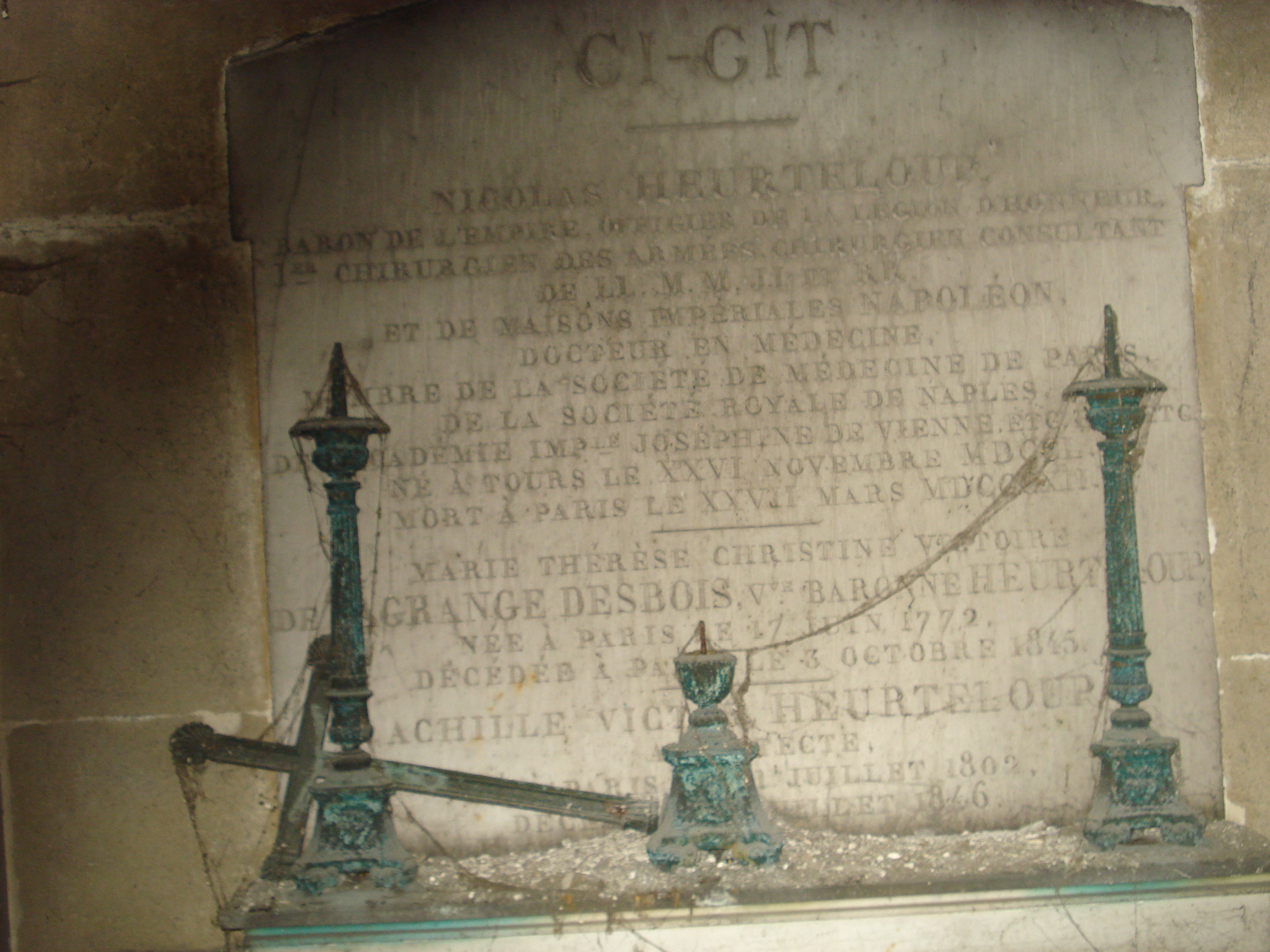 HEURTELOUP Nicolas , (1750-1812), médecin et chirurgien militaire français, né le 26 novembre 1750 à Tours (Indre-et-Loire) et mort à Paris le 27 mars 1812. Il succède à Pierre-François Percy et précède Dominique-Jean Larrey comme chirurgien en chef de la Grande Armée. – DE LAGRANGE DESBOIS Marie-Thérèse-Christine-Victoire, (1772-1845), épouse de Nicolas Heurteloup, mariage le 21 mai 1791 à Saint-Eustache de Paris. – HEURTELOUP Achille-Victor, (1802-1846), architecte, fils de Nicolas Heurteloup. – MAGATY, Madame CHRÉTIEN de LACROIX, décédée le 18 juin 1843.